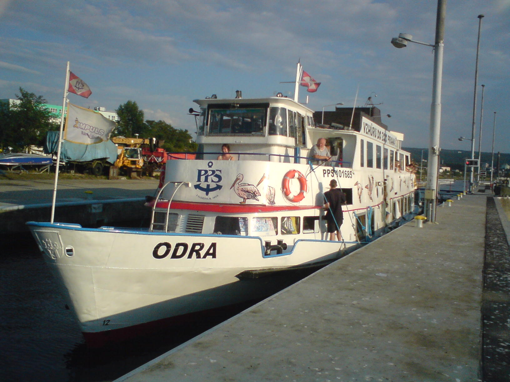 Odra Odra na lince na Slapy při proplavování plavební komorou v Praze - Modřanech